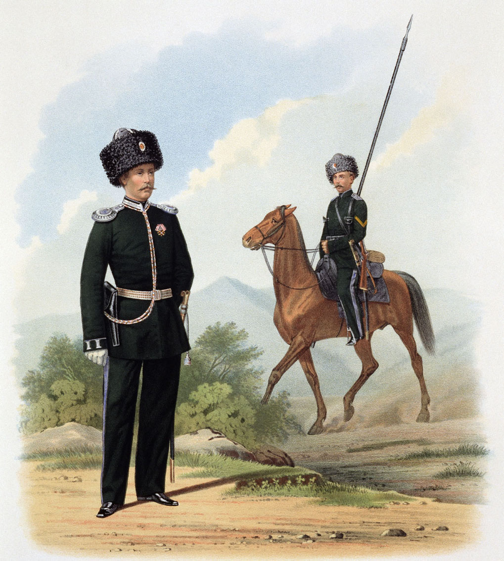 Оренбургское казачье войско: пешие батальоны и конные полки, 21 октября 1867. (В парадной форме).